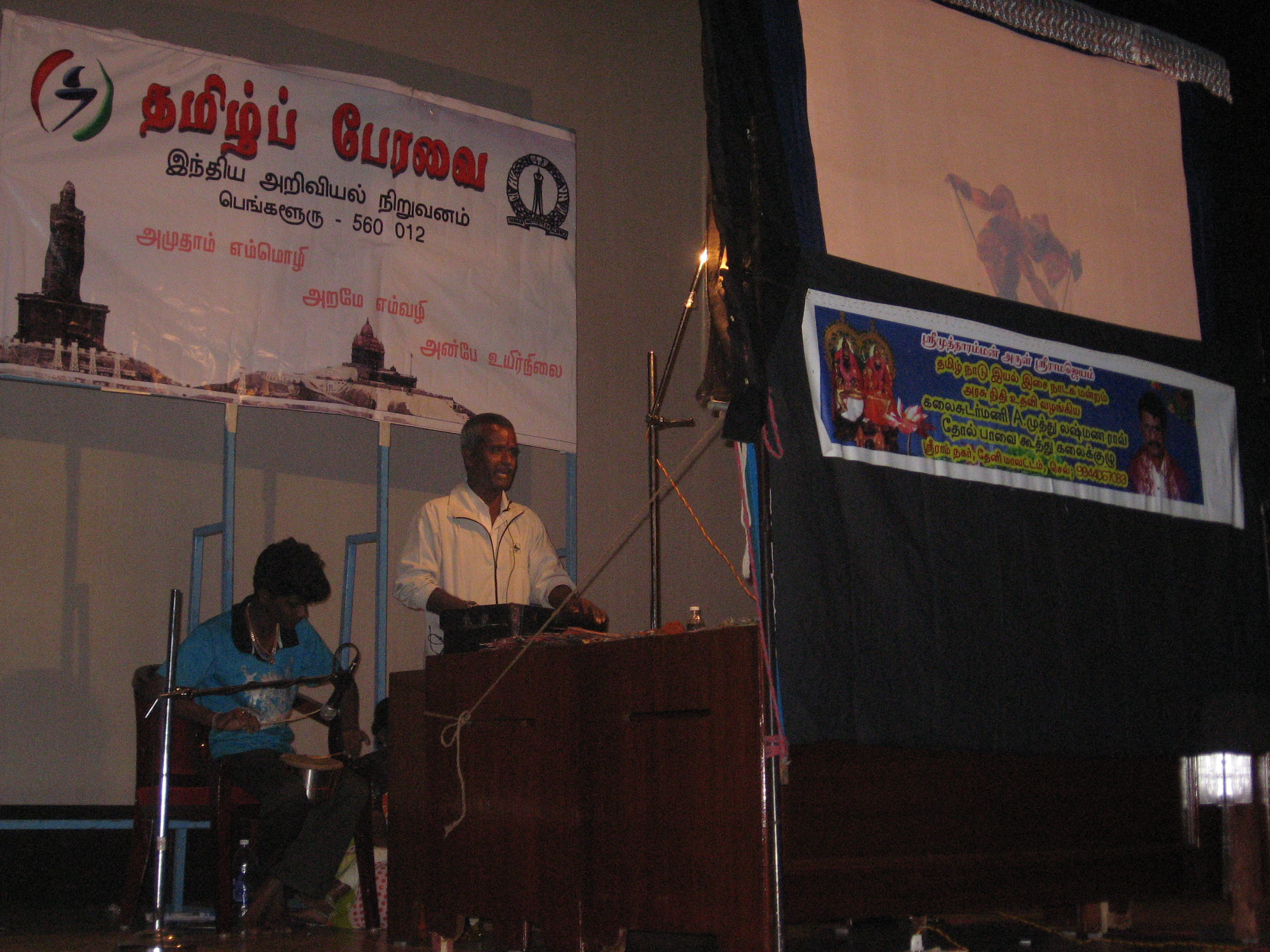 தோல் பாவை நிழற்கூத்து நடக்கிறது